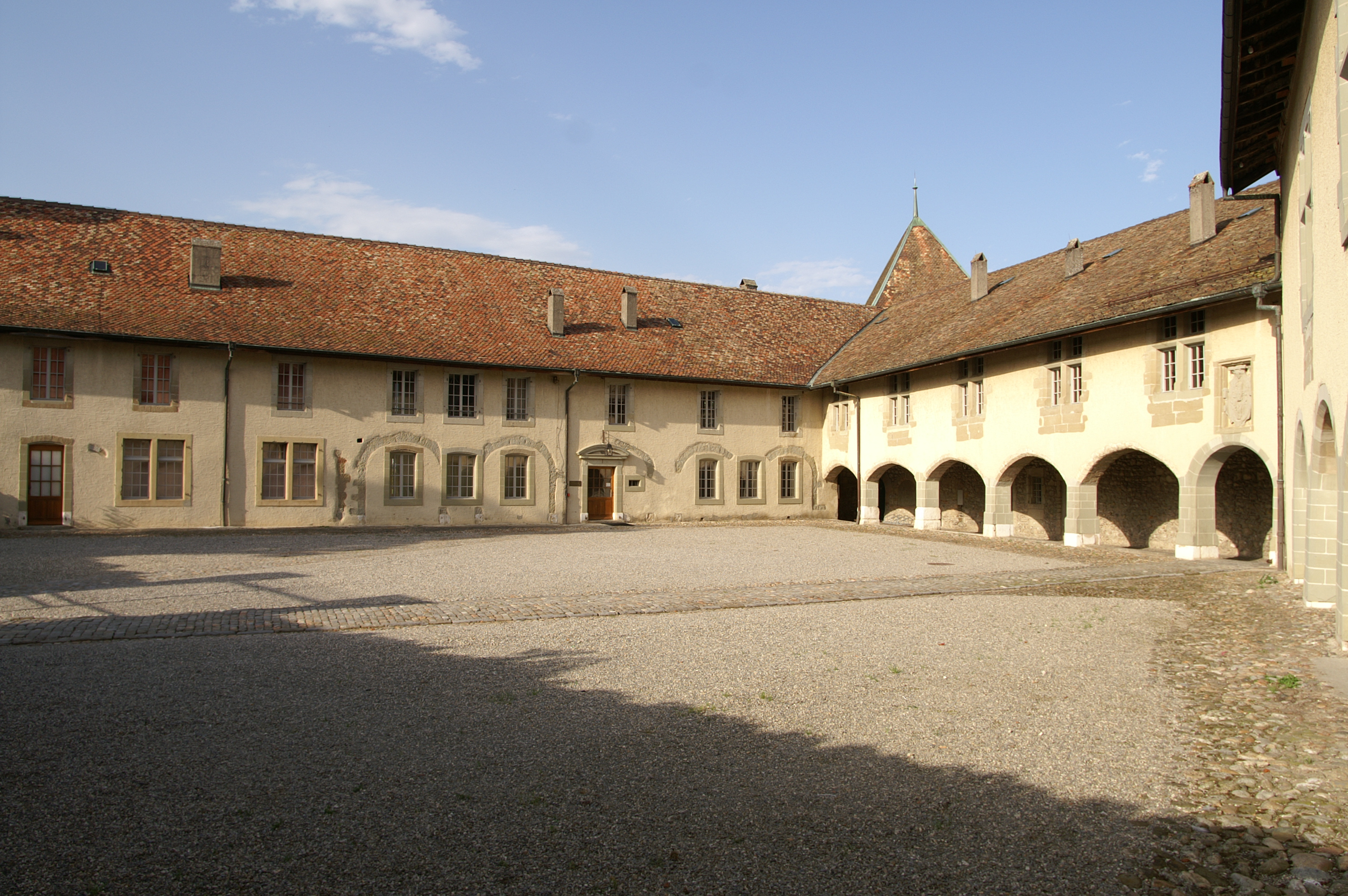 Cour interne du château de Rolle.